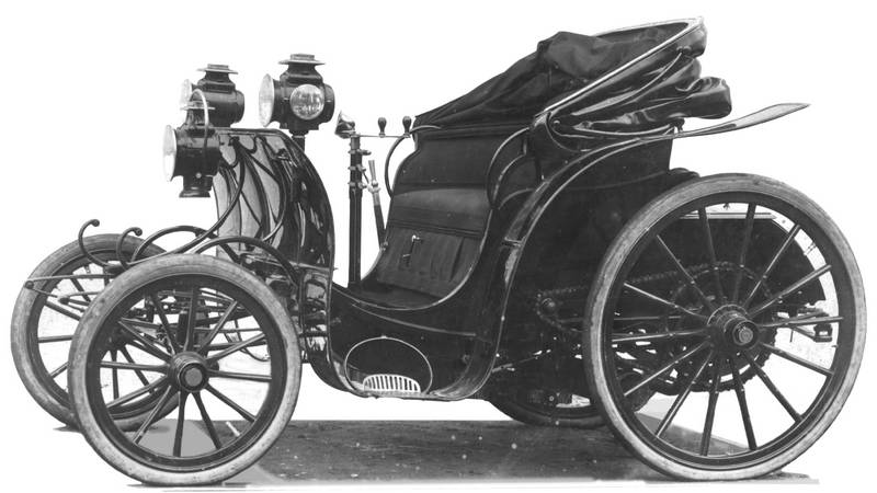 Véhicule Audibert et Lavirotte : modèle Duc deux places 1896.